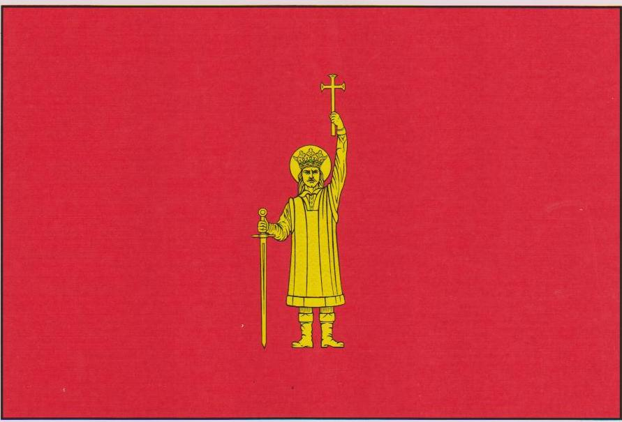 Acesta este drapelul orașului Ștefan Vodă